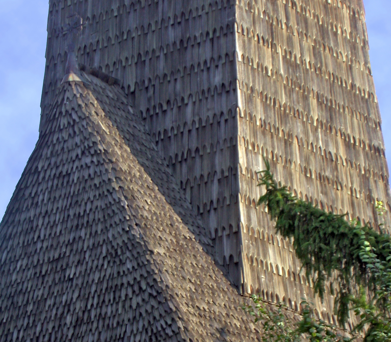 Romania, Bucarest, chiesa in legno dalla Transilvania, nel "Village Museum", particolare dei tetti.